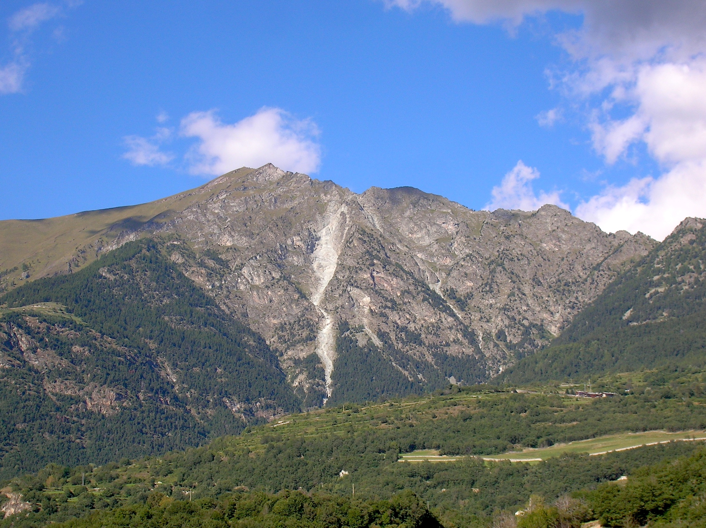 Monte Zerbion visto dal geosito Ponte romano - Tsailleun di Saint-Vincent, Valle d'Aosta, Italia This is a photo of a monument which is part of cultural heritage of Italy.